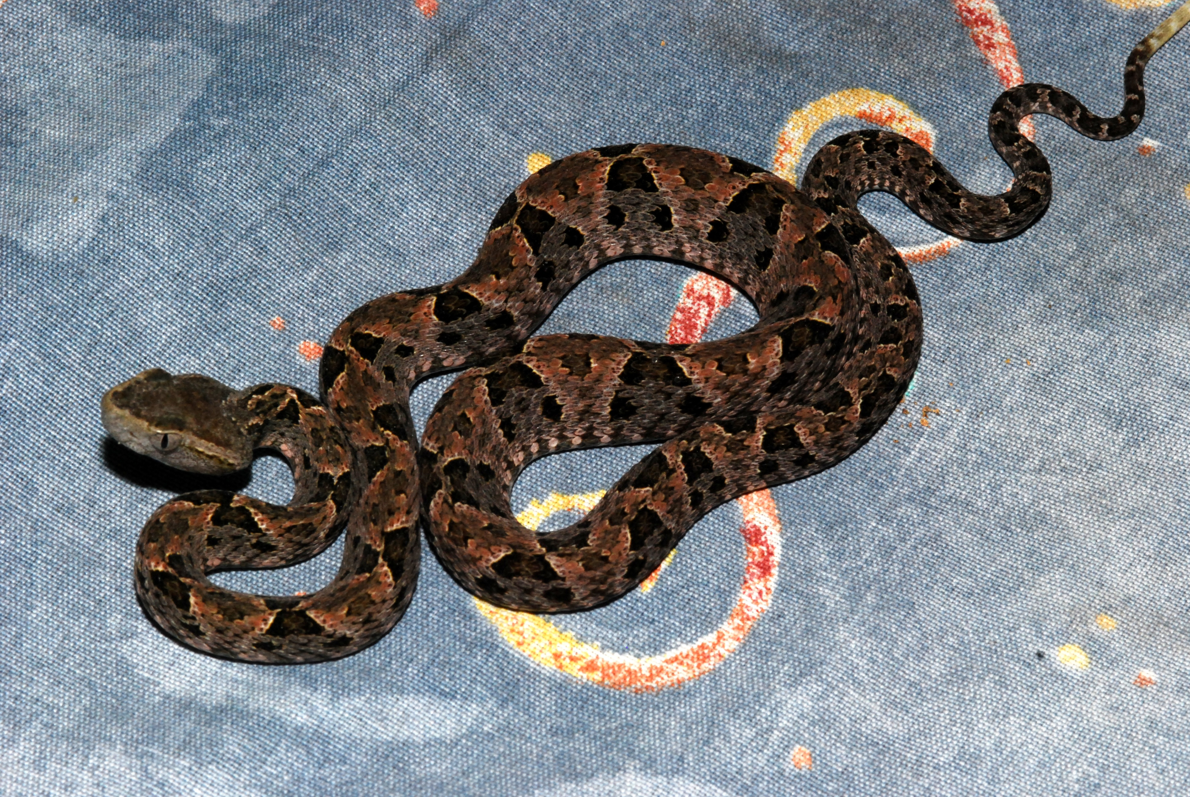 El Gringo Perdido, El Remate, GUATEMALA